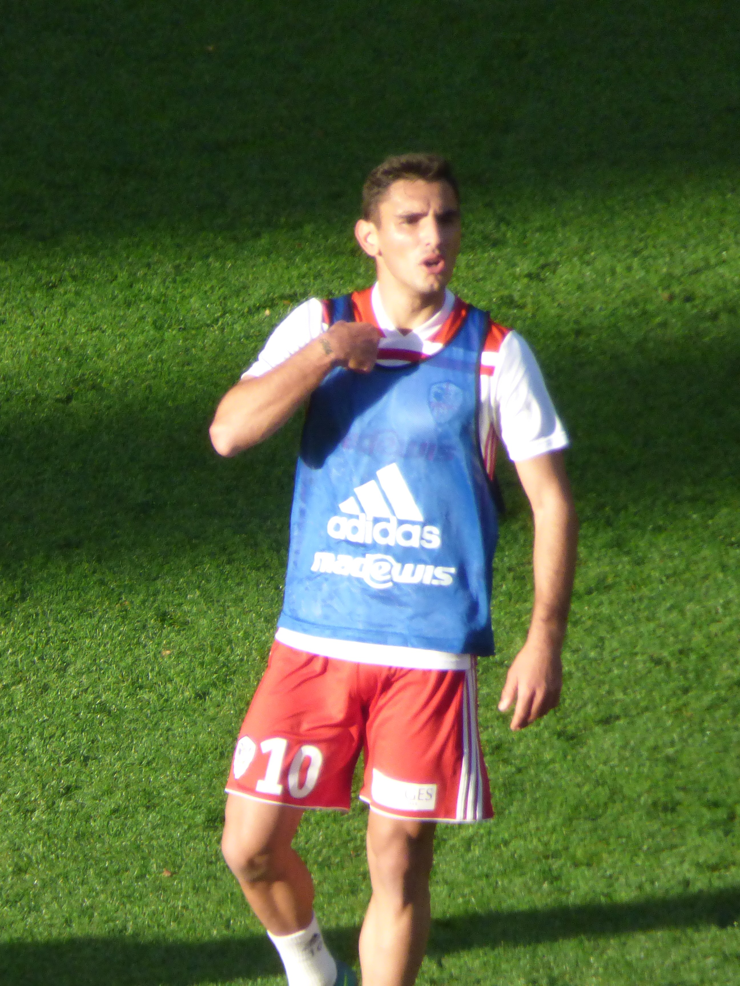 Qazim Laçi avant le match RC Lens - AC Ajaccio, comptant pour la dix-neuvième journée du championnat de France de Ligue 2 2018-2019, le 22 décembre 2018, au Stade Bollaert-Delelis de Lens.